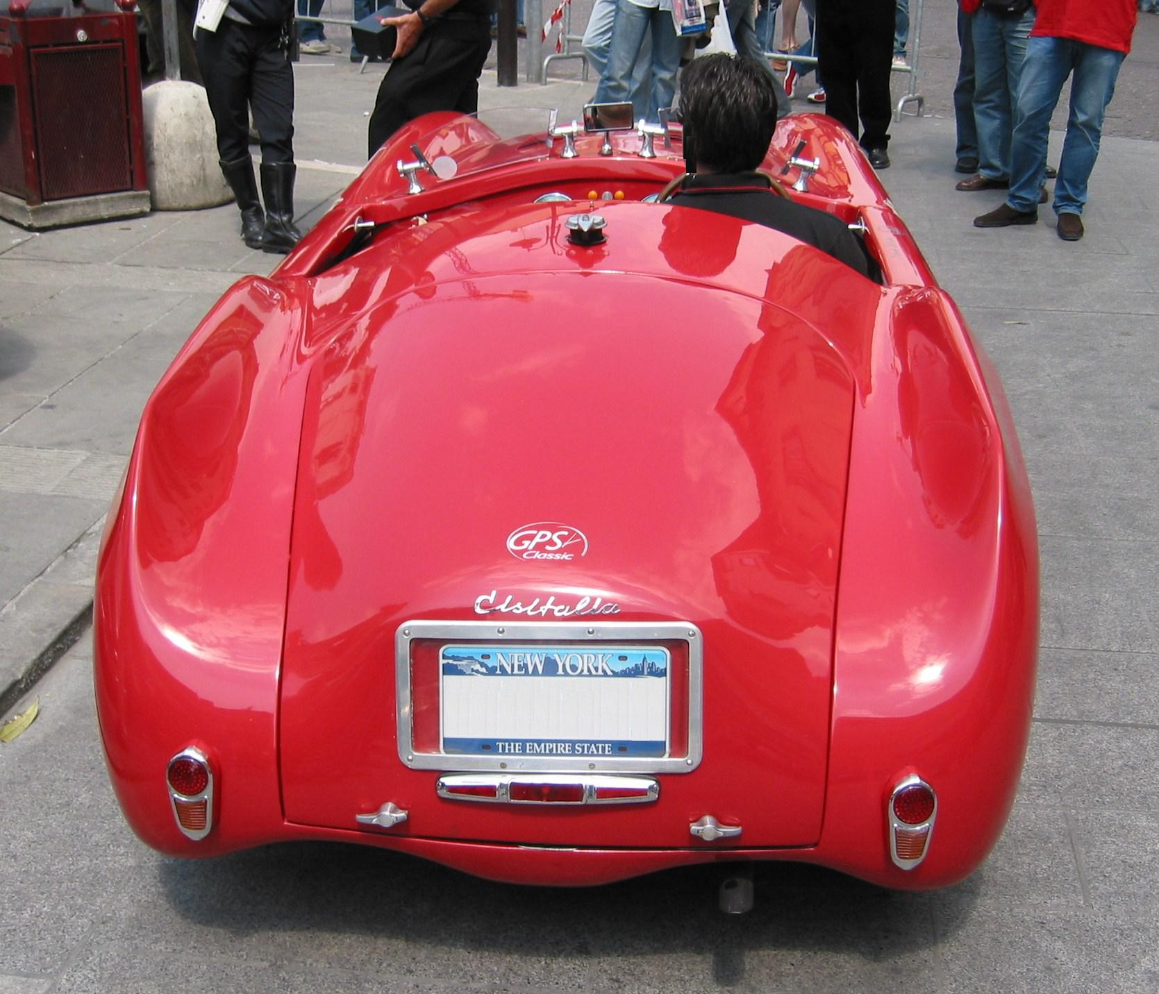 Cisitalia 1948